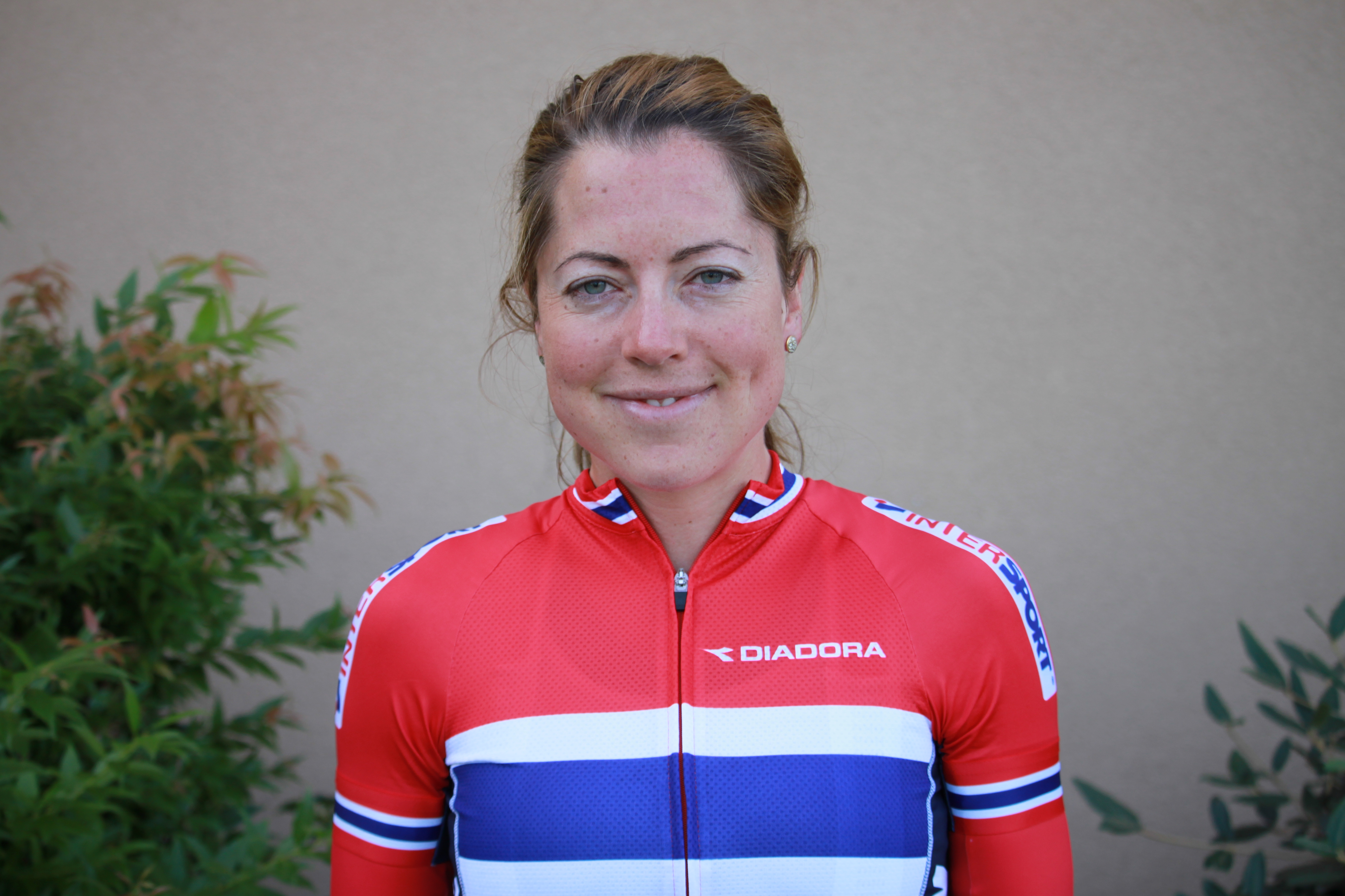 Ingrid Lorvik under sykkel-VM 2015.